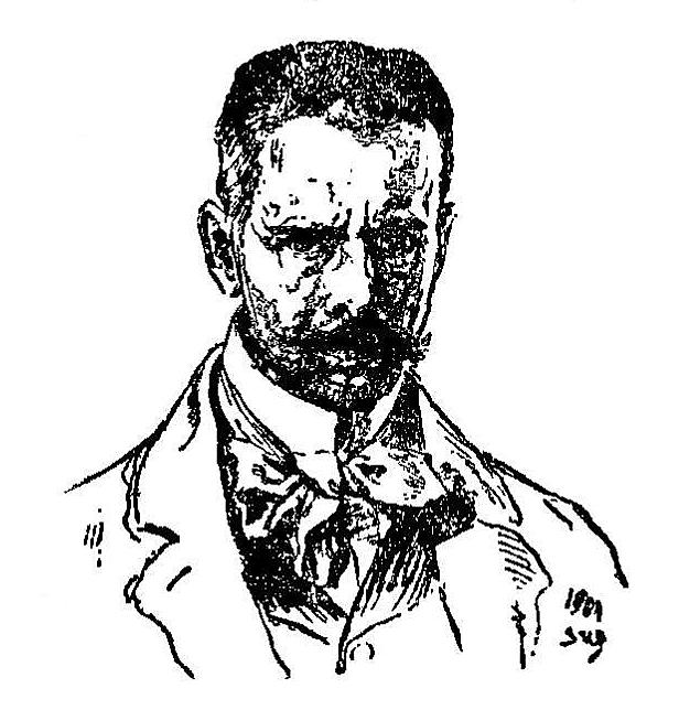 Stanisław Batowski (1907)